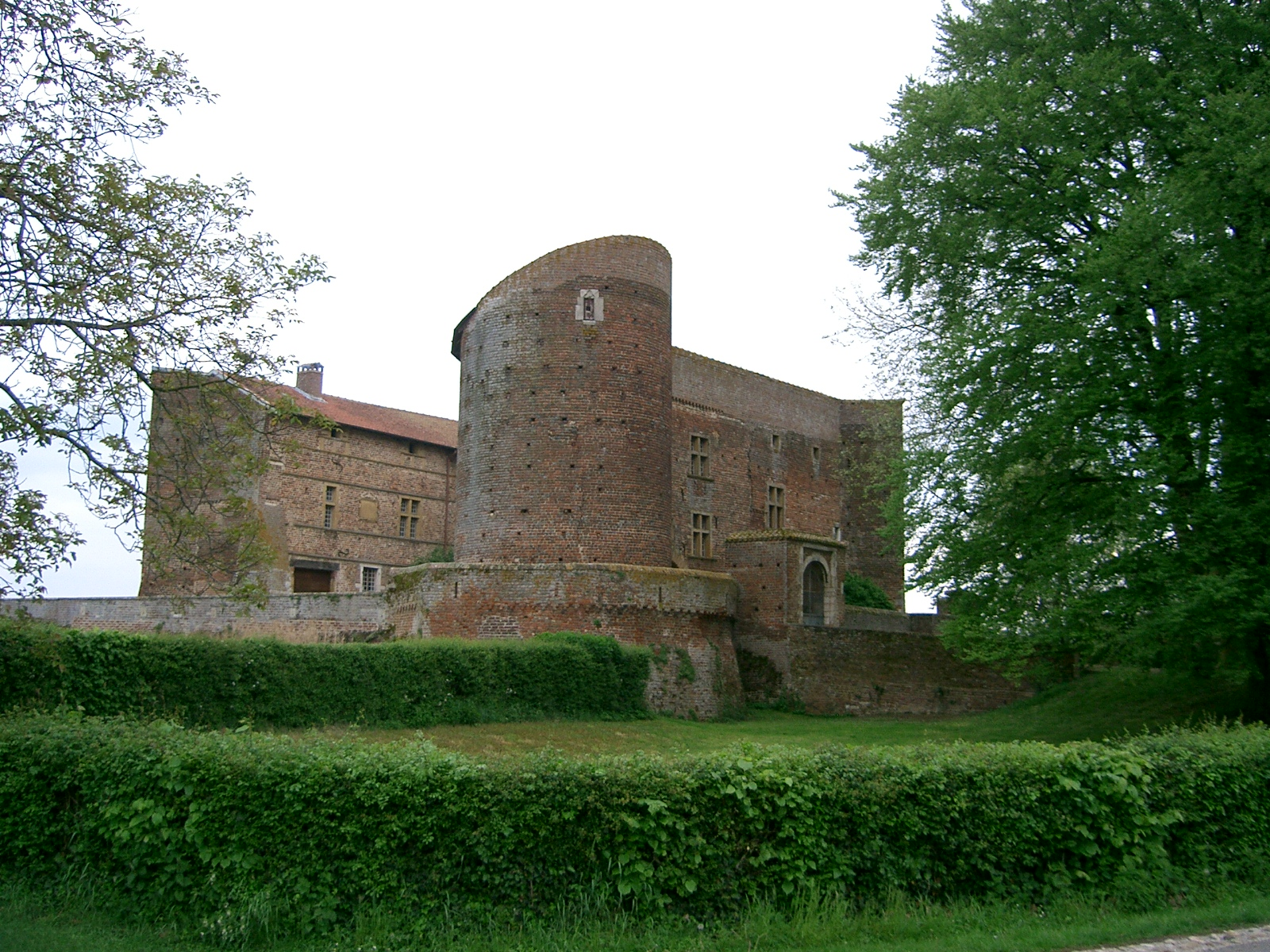 château de Bouligneux dans la Dombes (département de l'Ain - France) - château fortifié des XIVe - XVIIe siècles